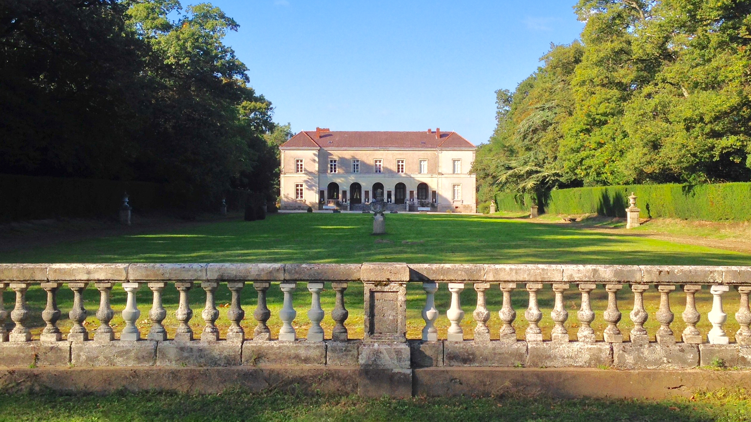 Villa d’Omblepied à Oudon. .